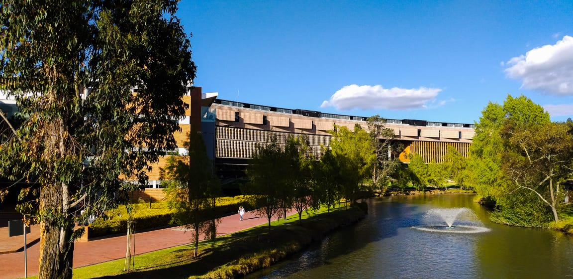 Foto de una parte del campus